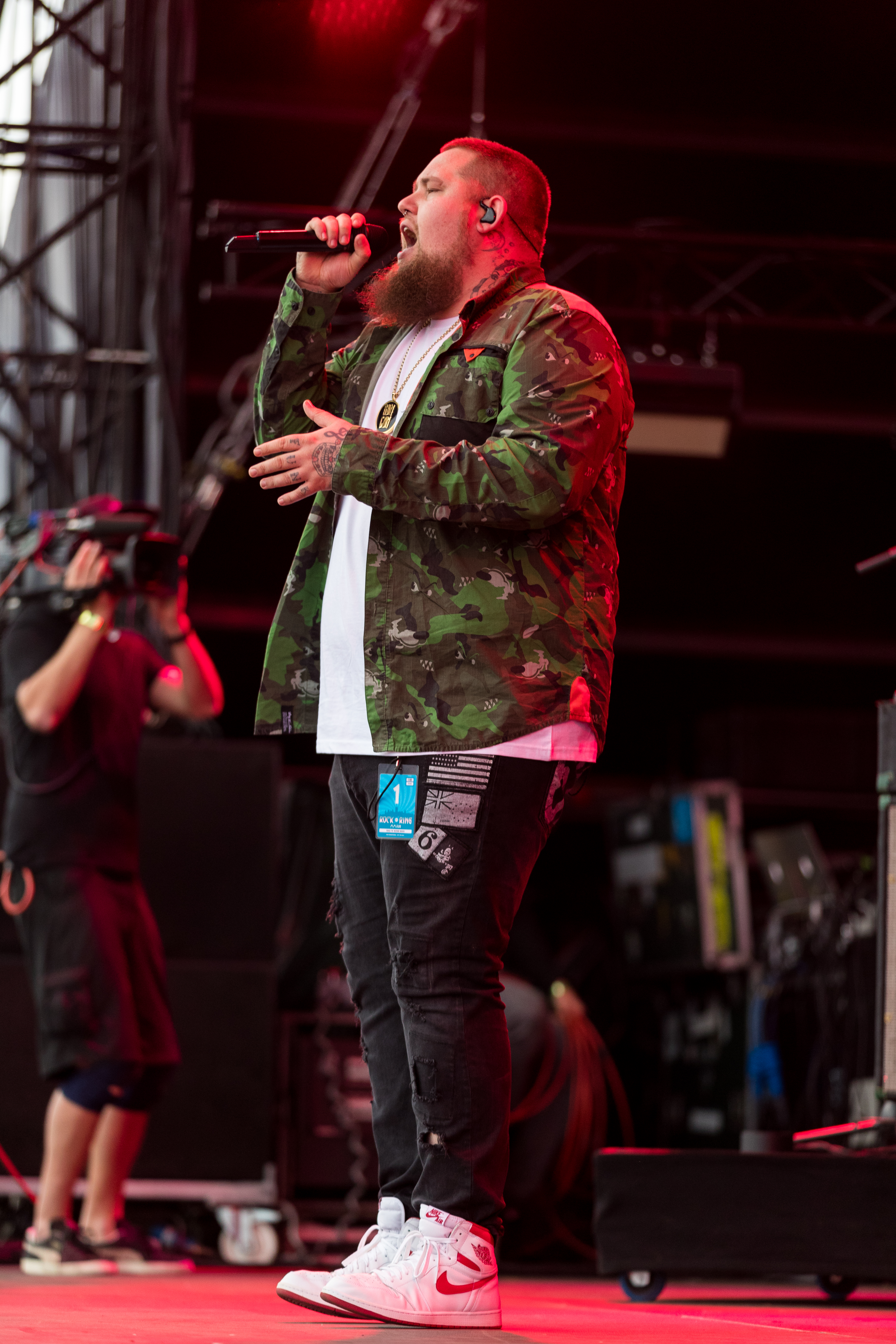 Rag'n'Bone Man during Rock am Ring at Nürburgring, Nürnburg, Rheinland Pfalz, Germany on 2017-06-02, Photo: Sven Mandel